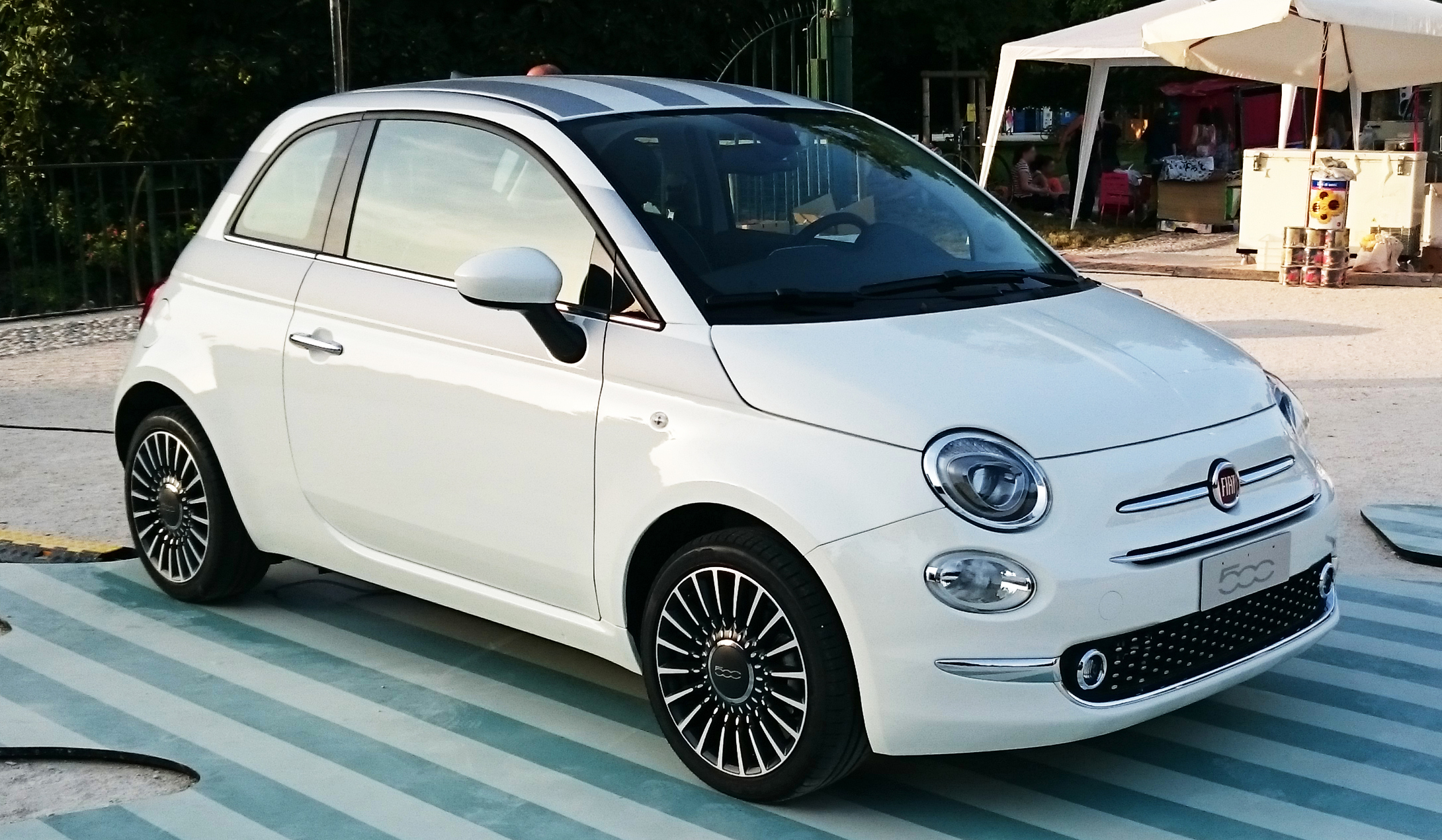 Il restyling della Fiat 500 nel luglio 2015 esposta al Parco Sempione di Milano (Castello Sforzesco). Alla presentazione erano presenti un modello viola e un modello bianco